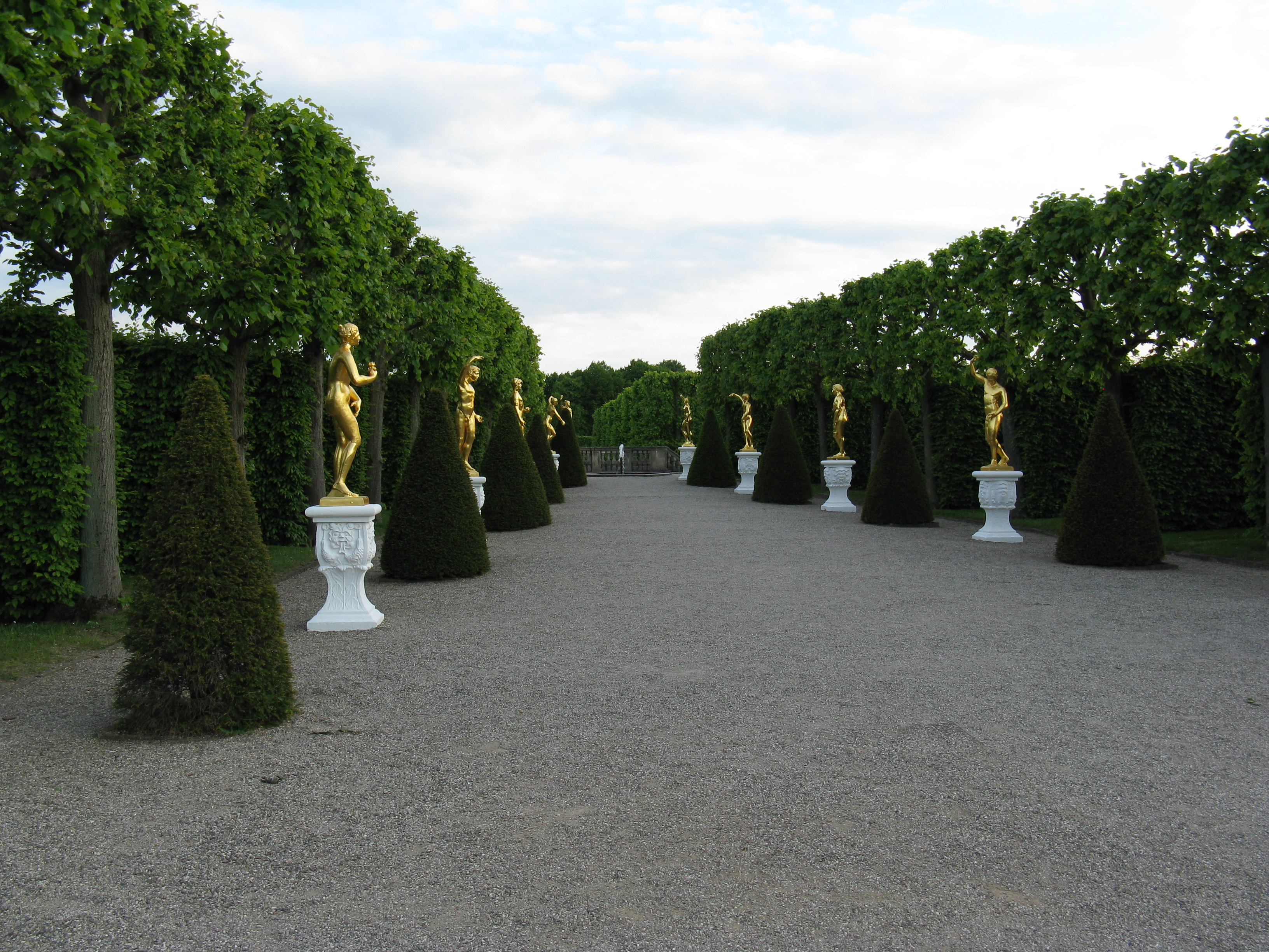 Großer Garten in Hannover-Herrenhausen: Theater